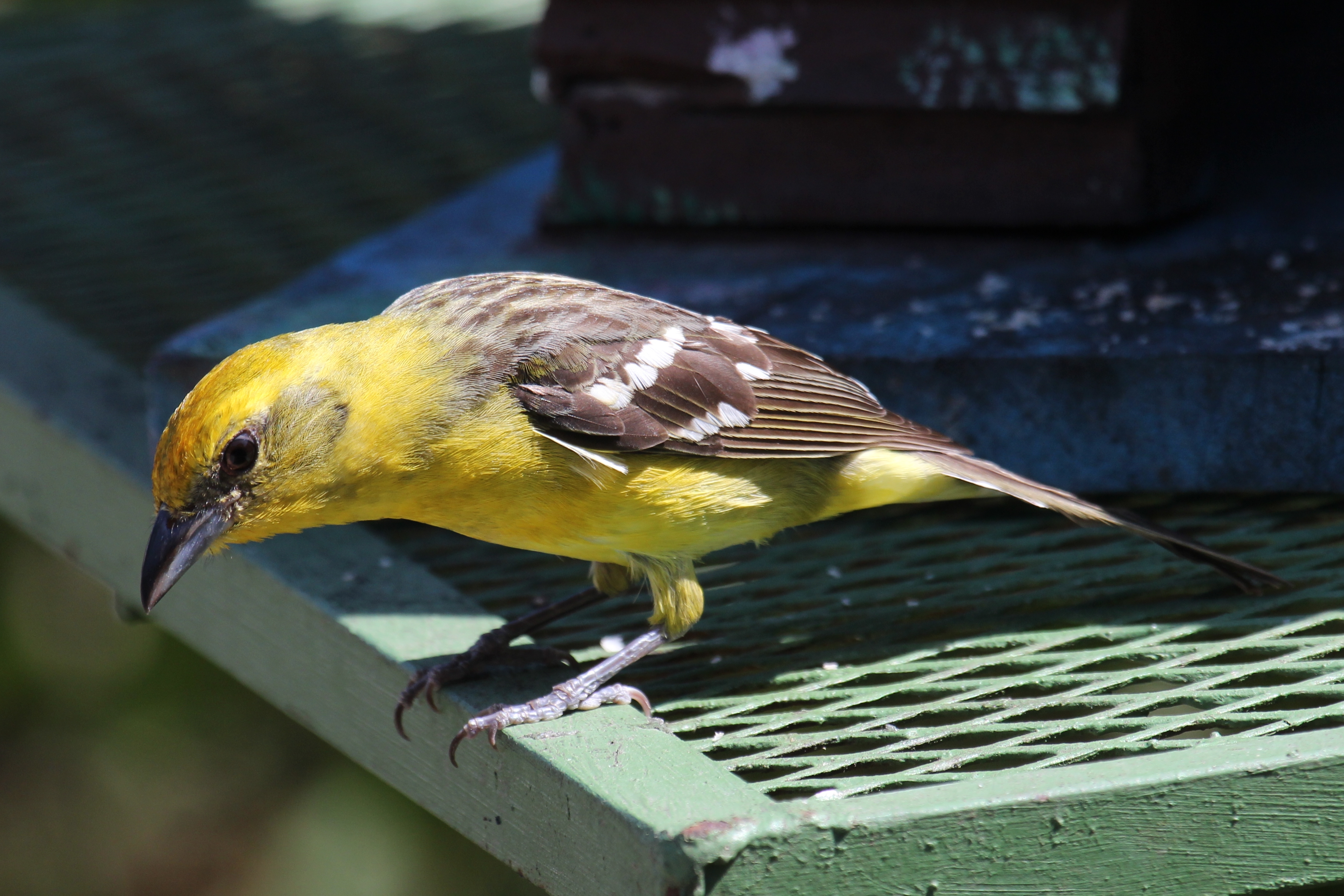 Female